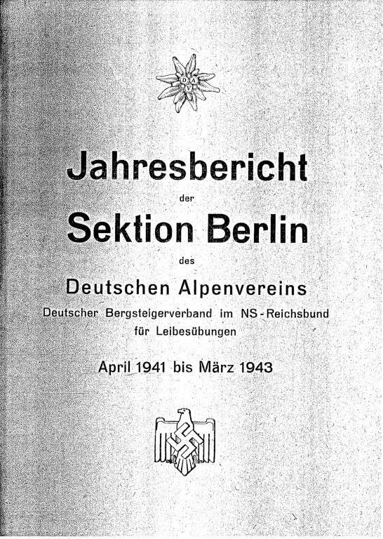 Titelblatt der Jahresberichte 1941-1943 der Sektion Berlin im Deutschen Alpenverein